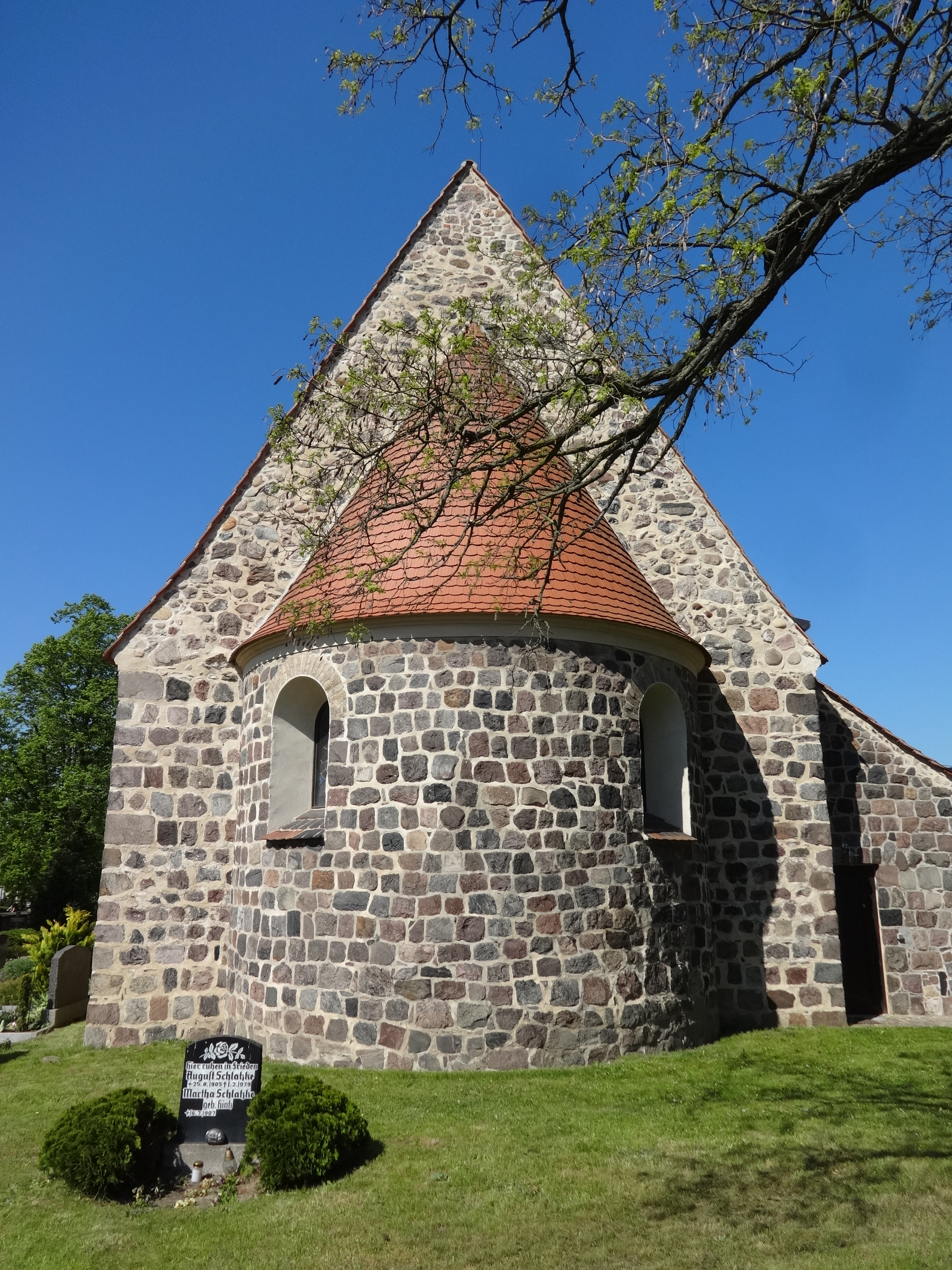 Die im Ursprung romanische Dorfkirche Siethen entstand im späten 13. oder frühen 14. Jahrhundert als Rechteckbau mit nachträglich angebauter Apsis. Im Innern befindet sich eine qualitätsvolle Ausstattung mit Kanzel, Altarretabel sowie Wappenschildern.